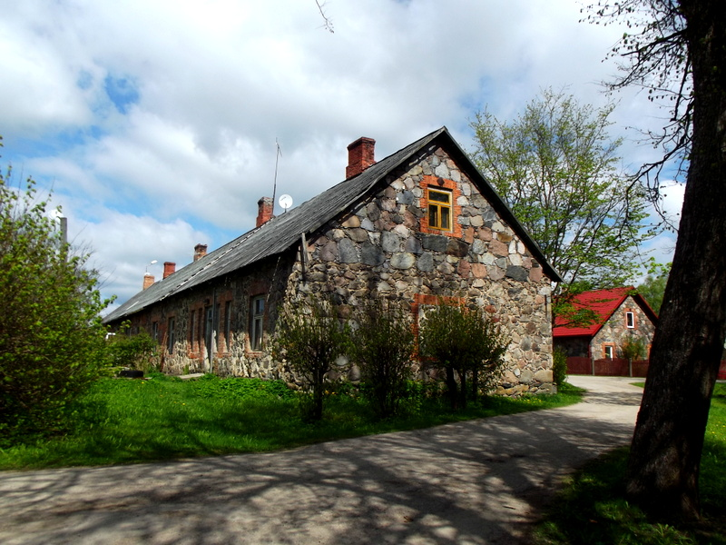 Mālupes muižas apbūve